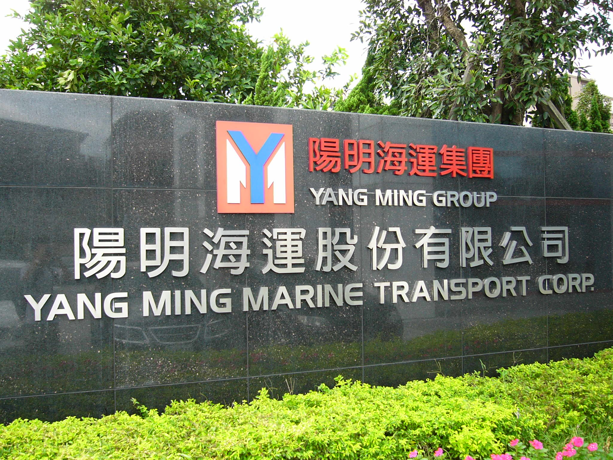 陽明海運總部廣場題字。